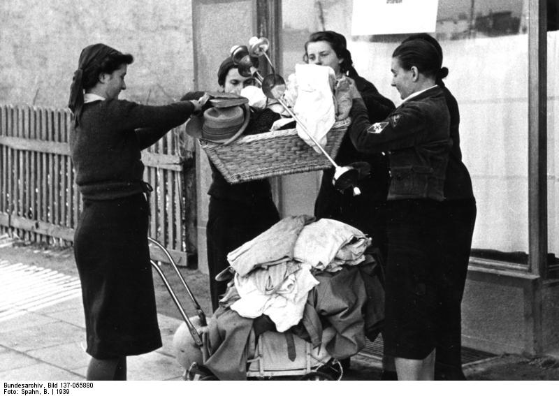 Polen, Baltendeutsche Umsiedler Adlershorst (Stadtteil vno Orłowo (Gdynia)) , Baltenumsiedlung: alle notwendigen Utensilien werden von der NSV-Dienststelle nach den geräumten polnischen Wohnungen gebracht [Polen, Adlershorst.- Einweisung Baltendeutscher Umsiedler in ehemals von Polen bewohnten Häusern.]